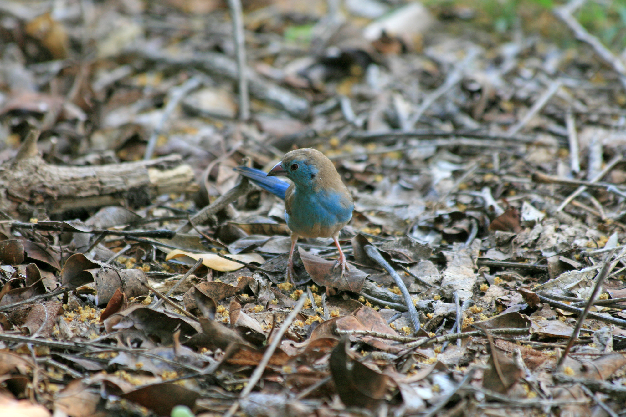 Uraeginthus bengalus Weibchen, aufgenommen im Selous Schutzgebiet in Tansania.